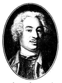 Sinclaire Malcolm